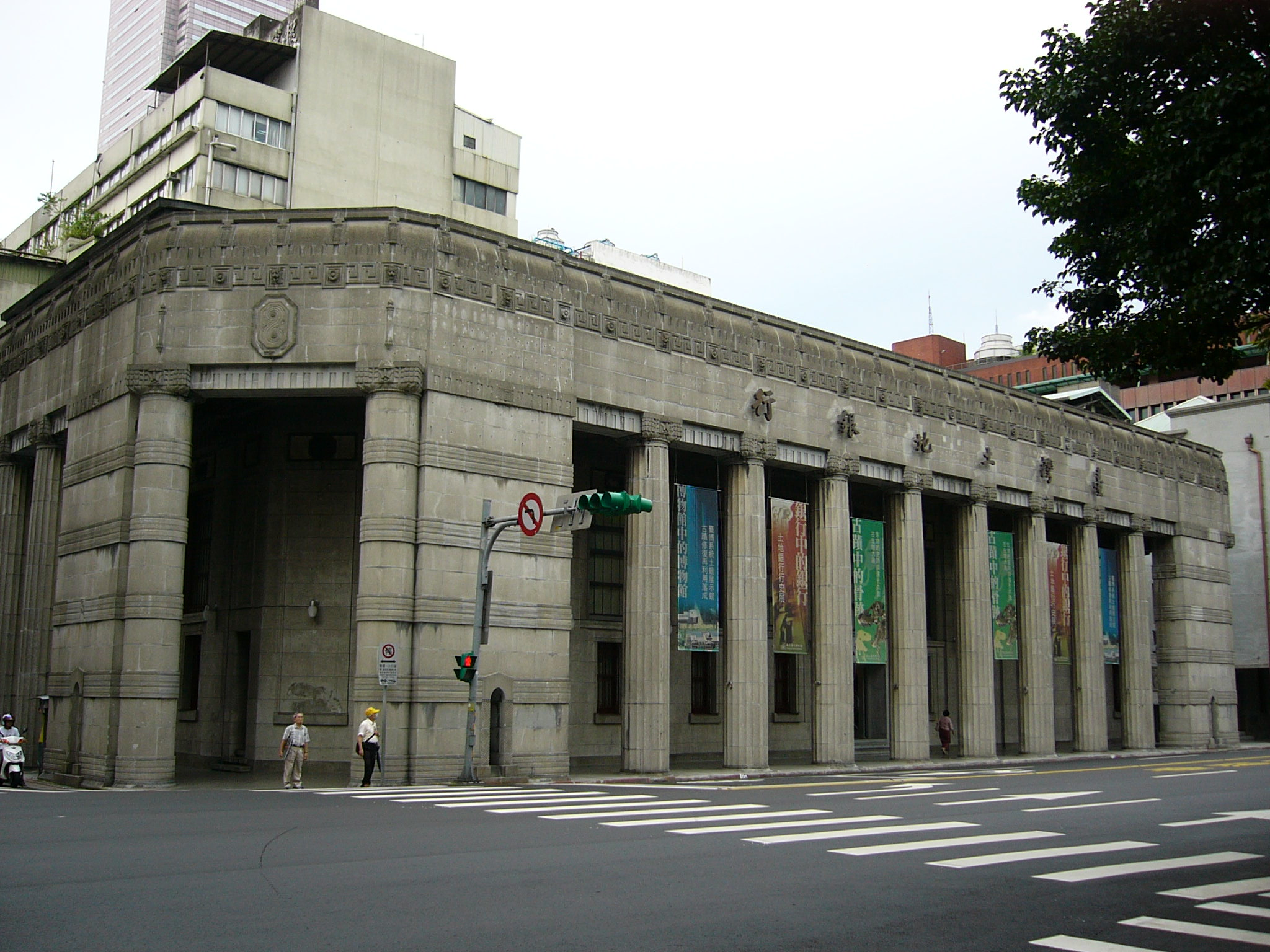 中文（台灣）: 國立臺灣博物館土銀展示館。